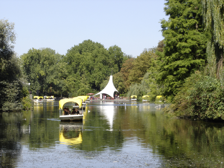 Luisenpark Mannheim Gondoletta